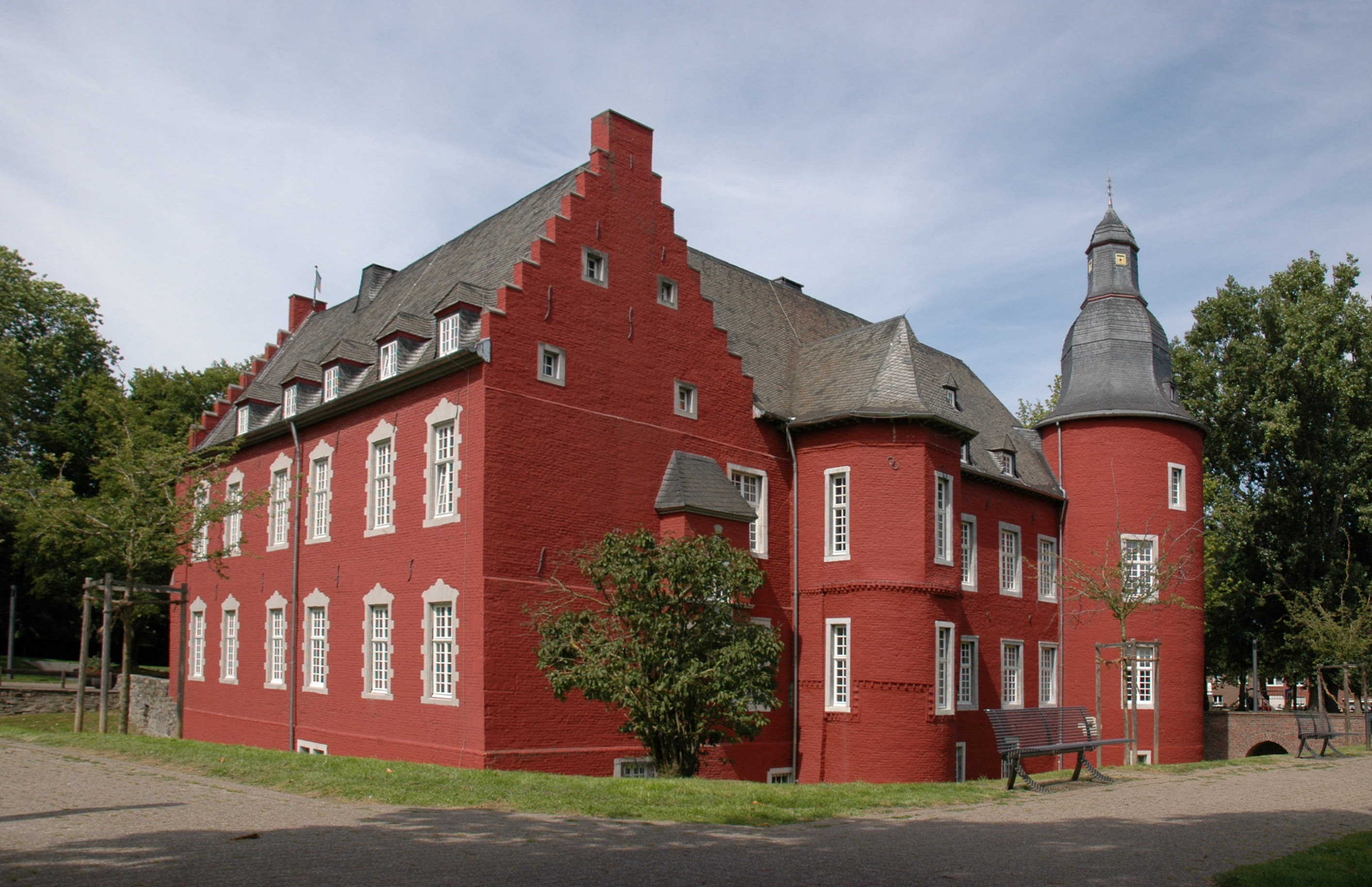 Burg Alsdorf, Südost-Ansicht